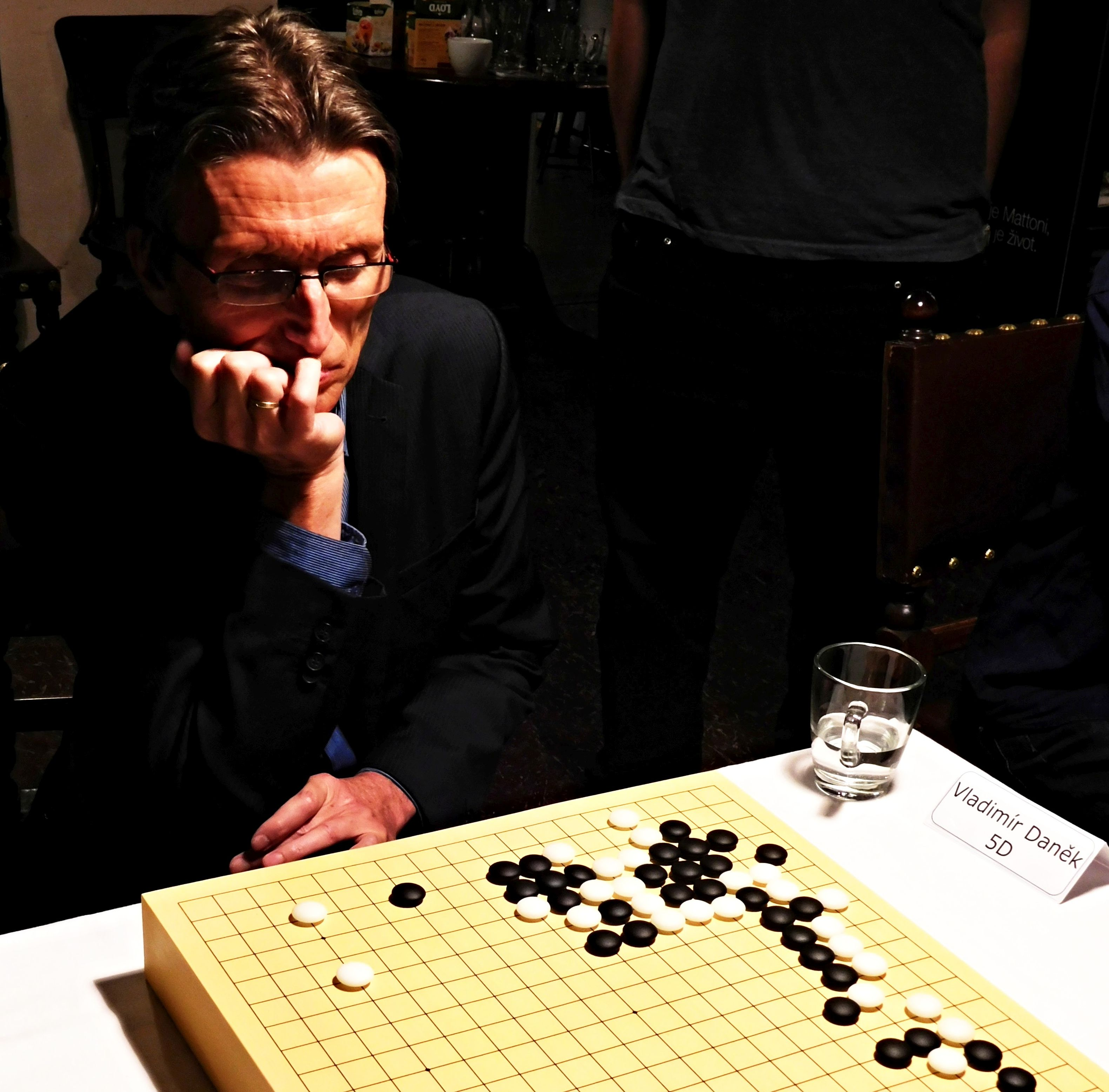 Vladimír Daněk 2017